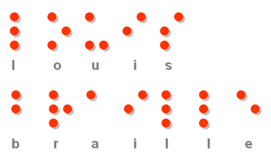 der Name Louis Braille in der Blindenschrift Braille